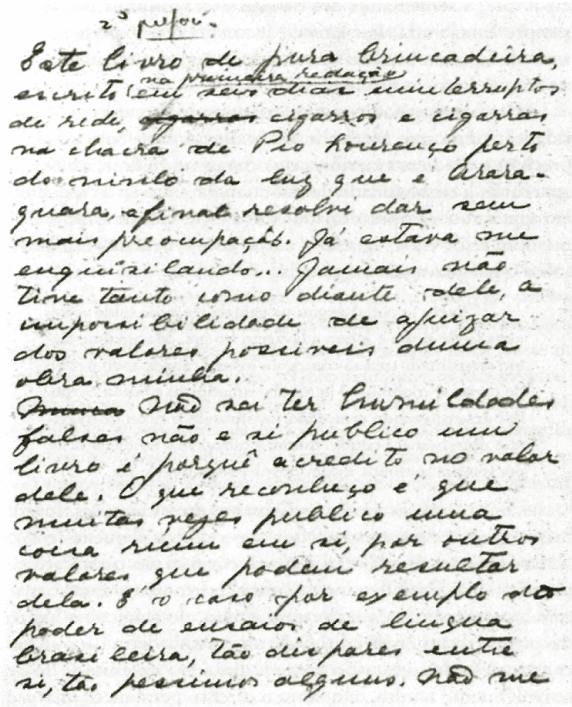 Início do segundo prefácio de Macunaíma